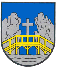 Герб города Мостиска (1799 г.)